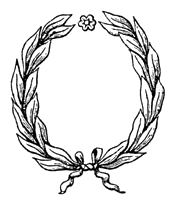 Corona triumphalis (Lorbeerkranz)